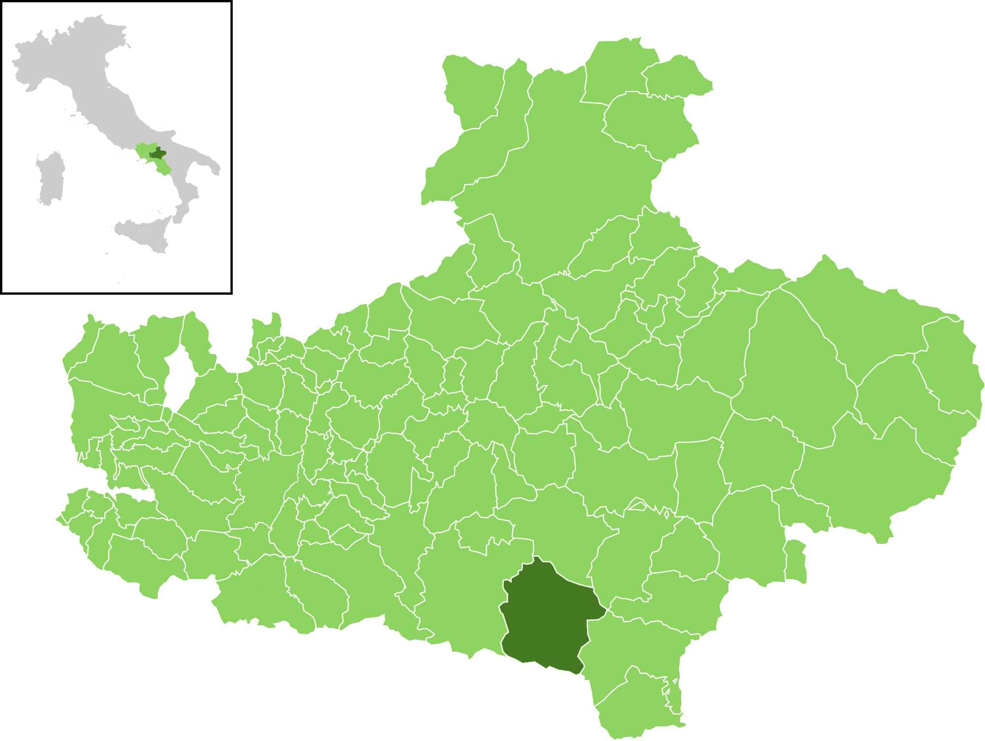 Il comune all'interno della provincia di Avellino